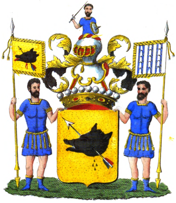 Armoiries de la famille Coppens